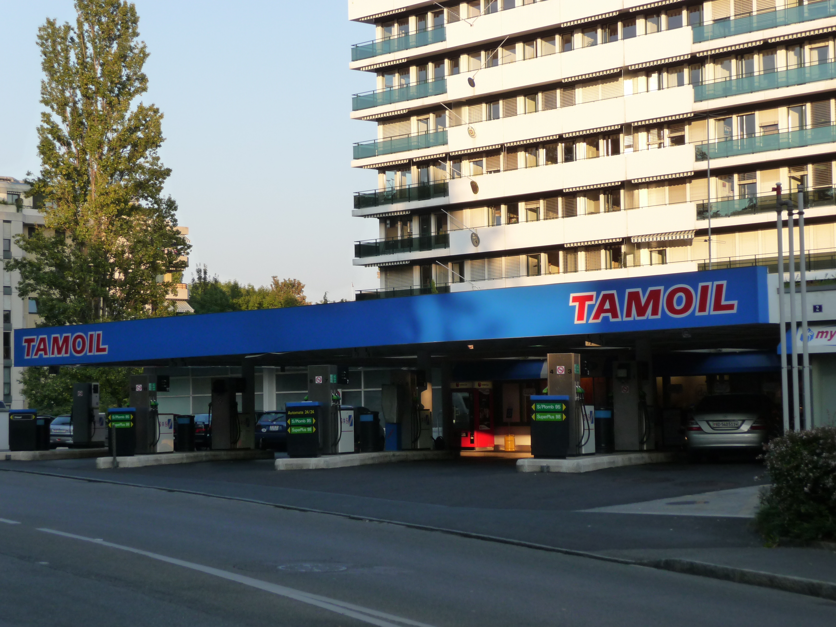 Une station-service de Tamoil à Genève.